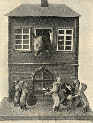 „Kittens serenading a pig“ (Kätzchen spielen dem Schwein ein Ständchen), Tierdiorama von Hermann Ploucquet, 1851.